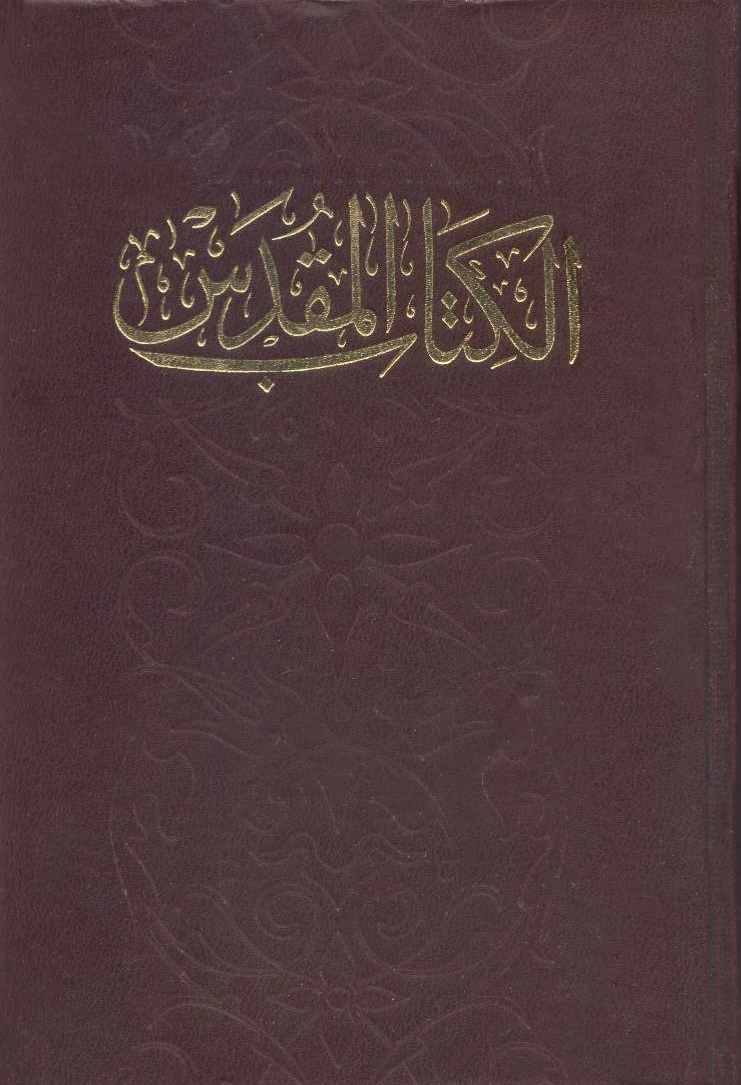 الكتاب المقدس ترجمة الفانديك، طبعة دار الكتاب المقدس، مصر.